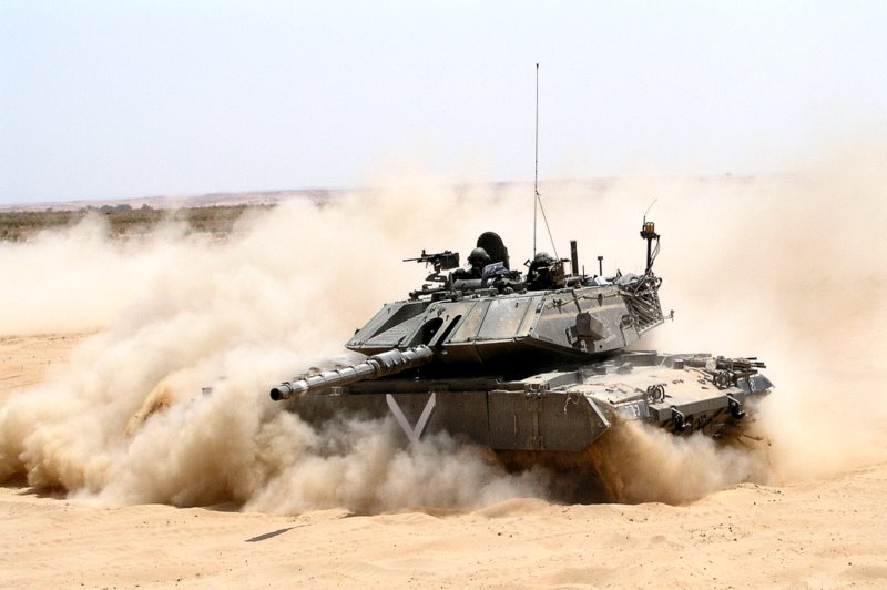 magach-7-c tank טנק מגח 7ג